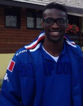 Pedro Obiang durante il ritiro della Sampdoria a Bardonecchia.